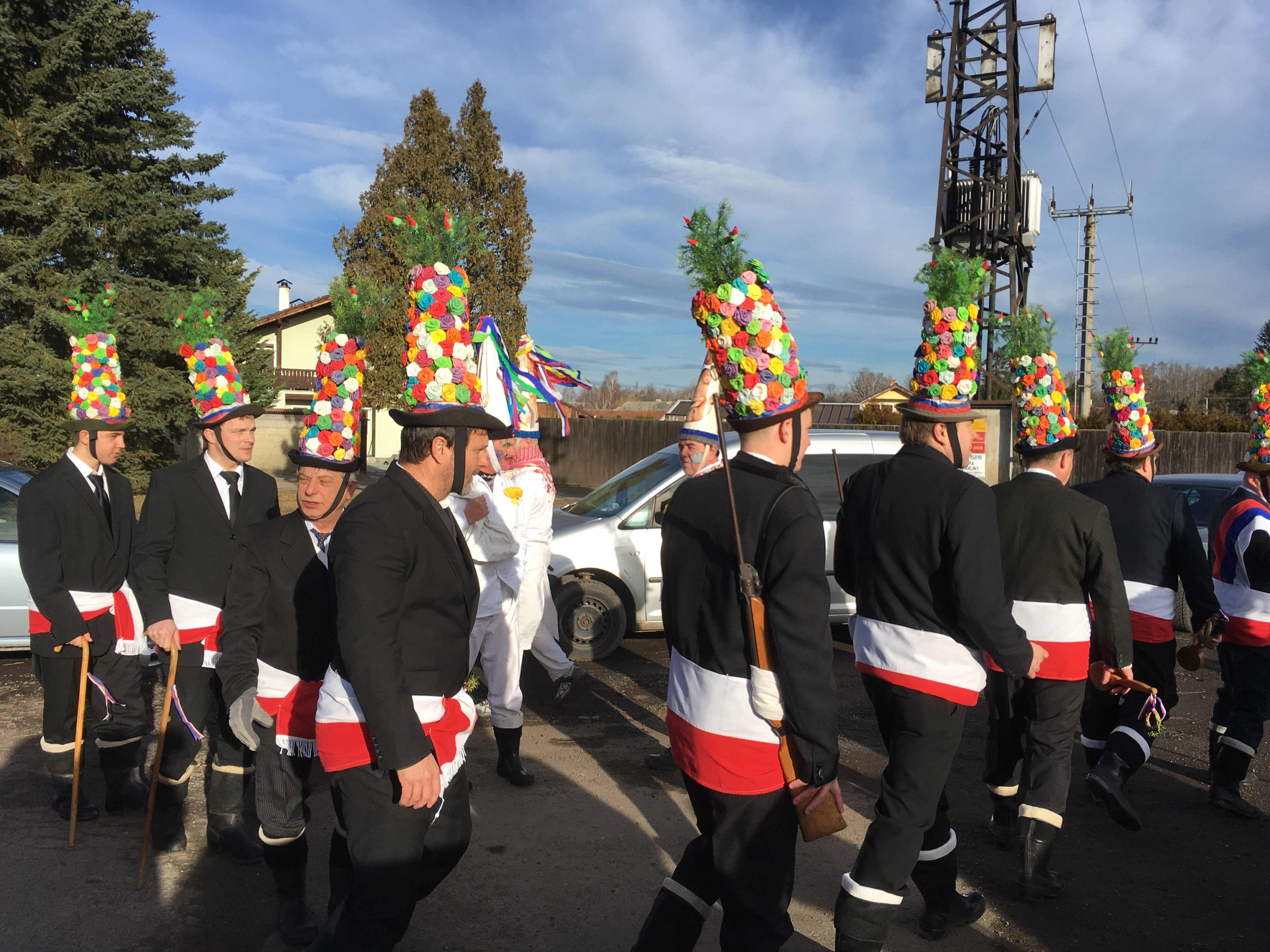 Koledníci odcházejí